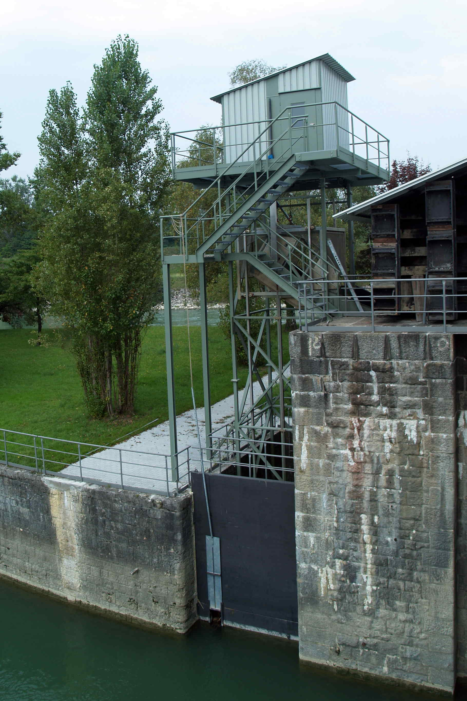 Fischlift beim Kraftwerk Wyhlen, deutsche Rheinseite